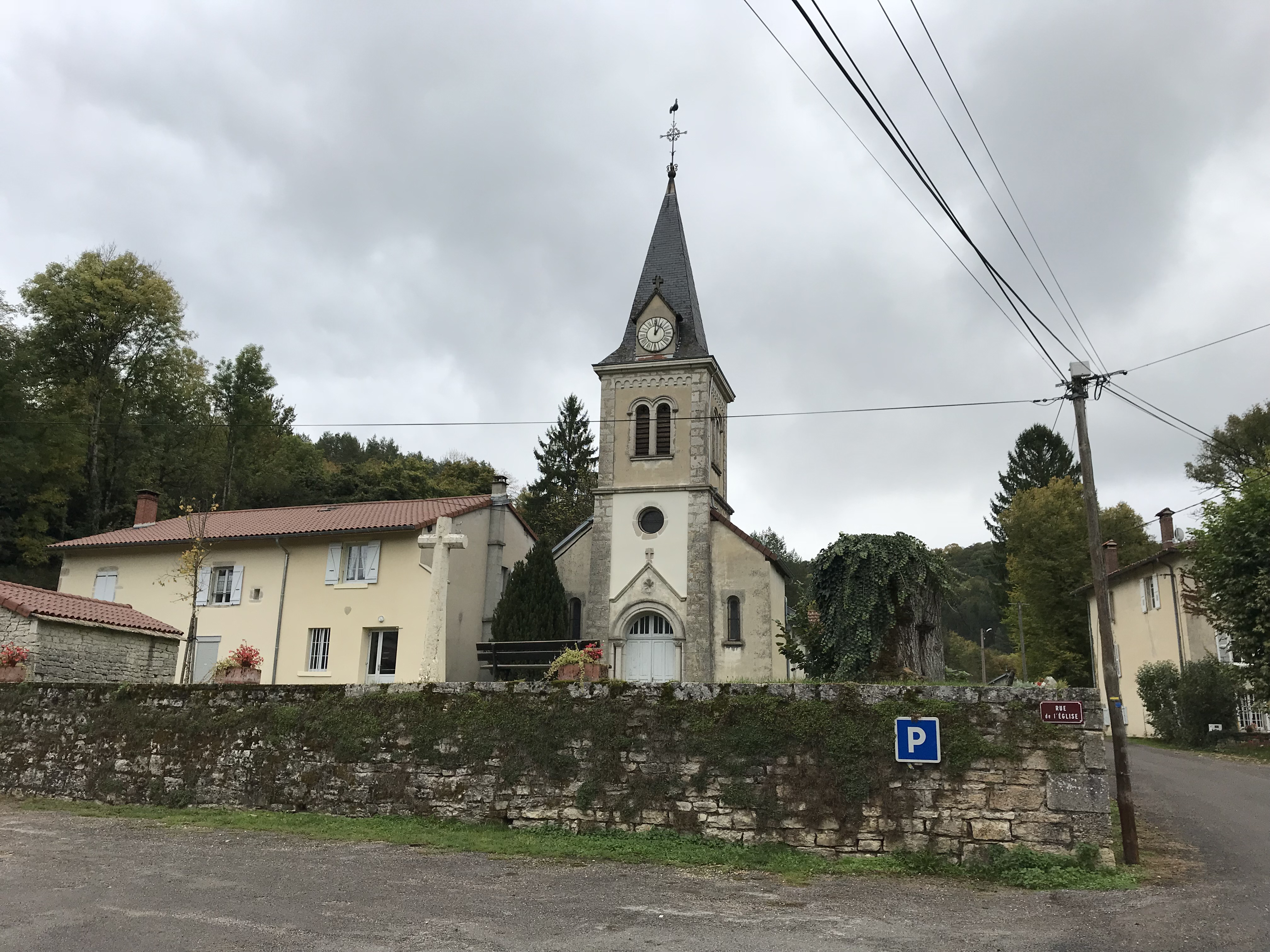 Villechantria (Jura, France) en octobre 2017.